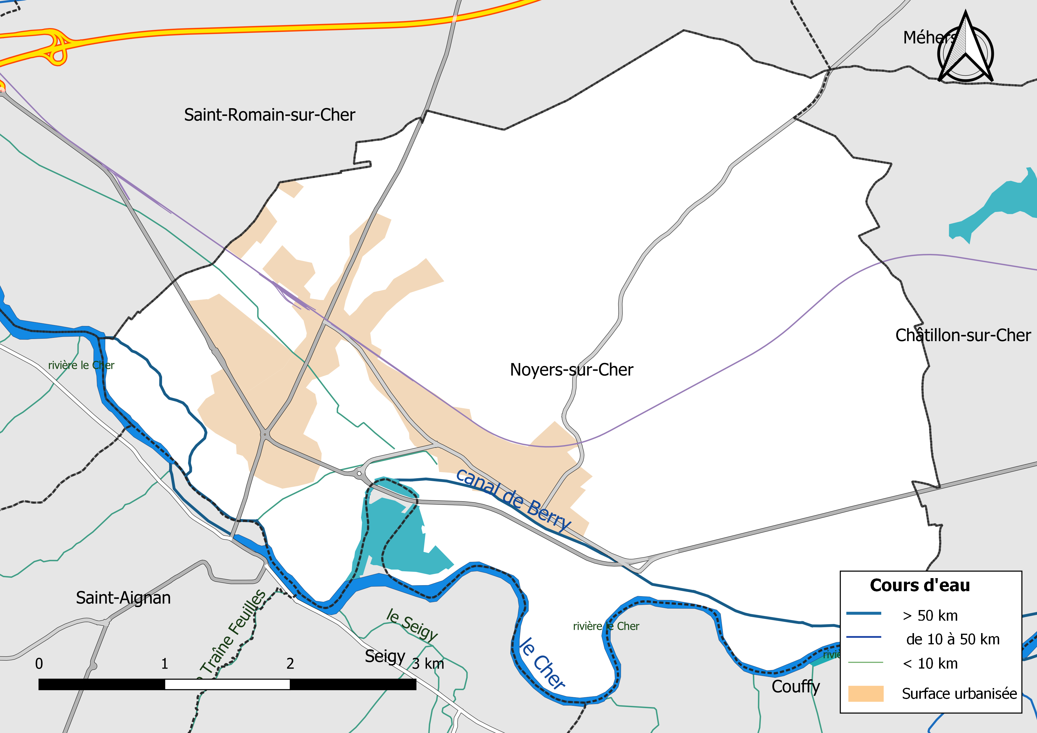 Carte du réseau hydrographique de la commune de Noyers-sur-Cher (Loir-et-Cher, France).